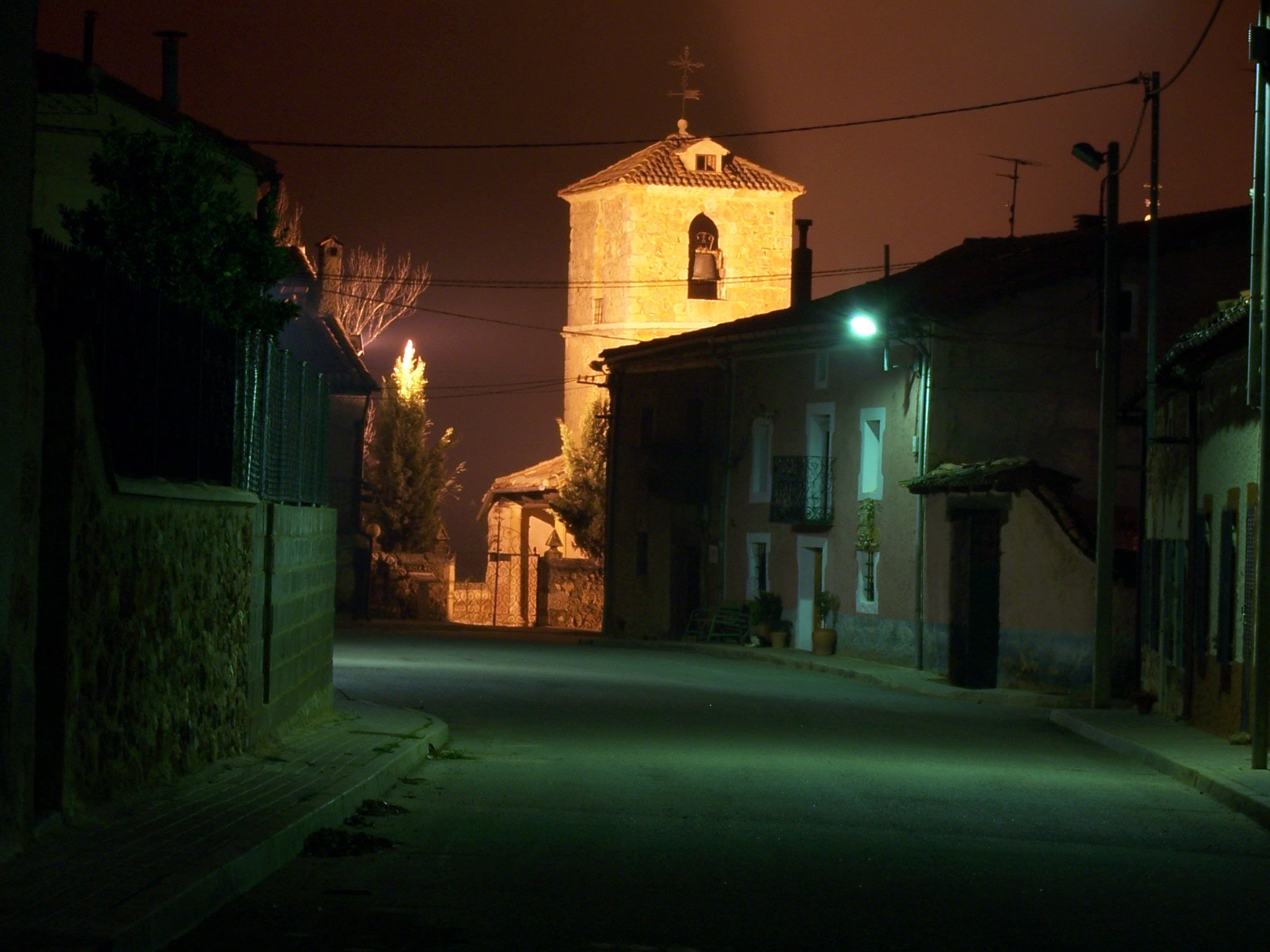 El campanario es visible desde todo el pueblo gracias a la iluminación nocturna